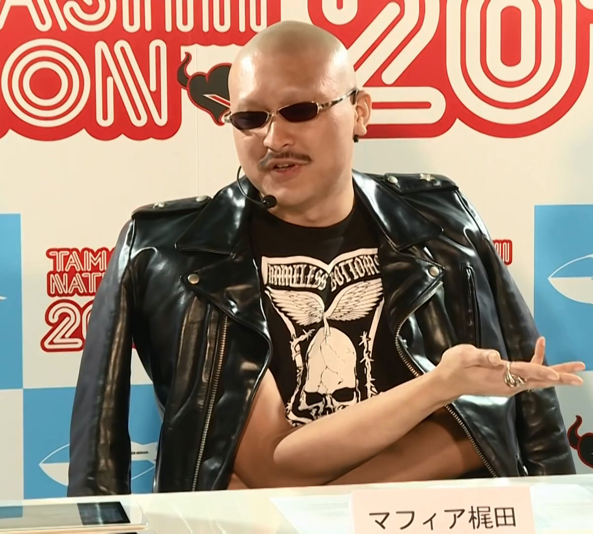 魂ネイション 2016「仮面ライダーエグゼイド～ノーコンティニューでフィギュアを語れ～